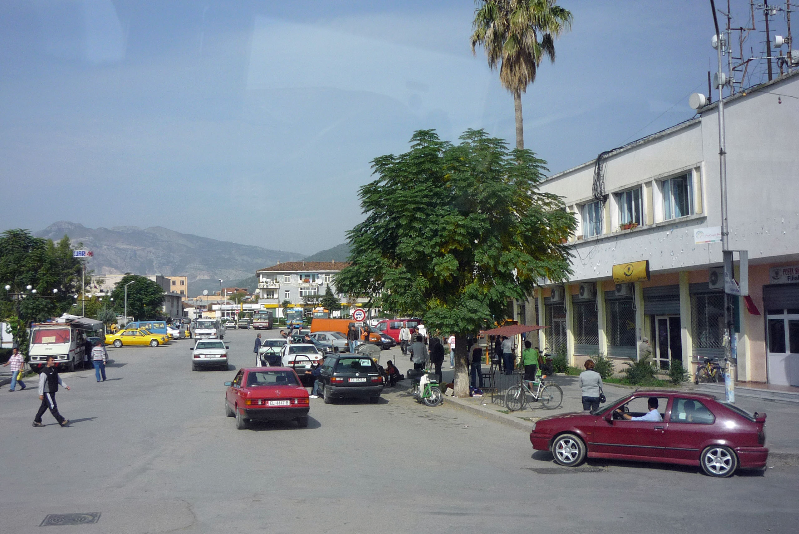 Elbasan